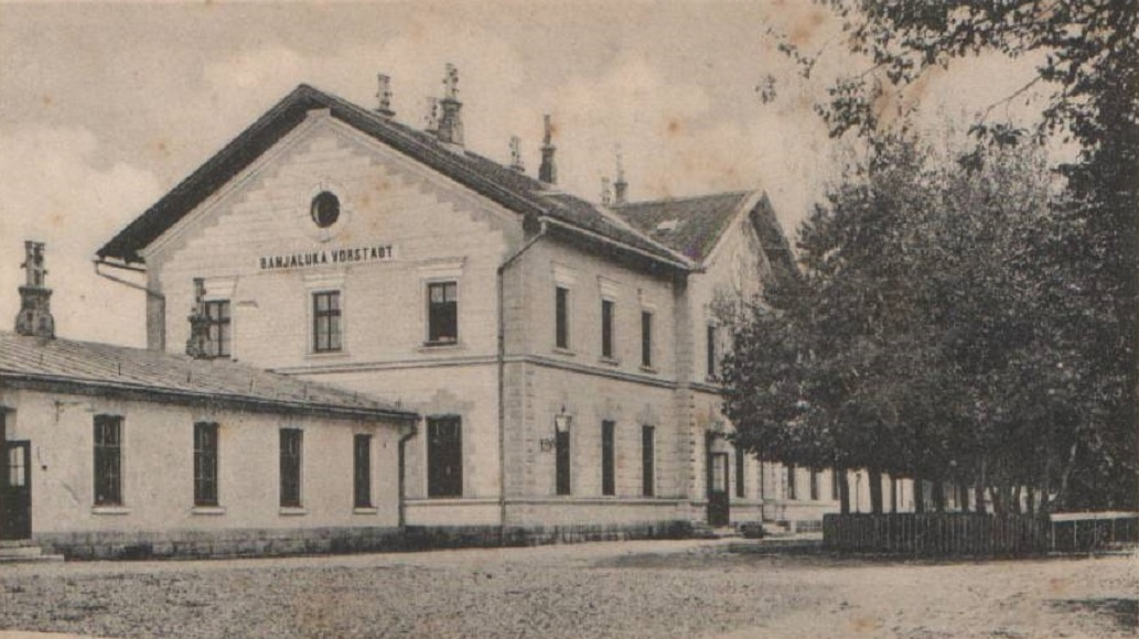 Das großzügige Aufnahmsgebäude des Vorstadtbahnhofs Banja Luka war ein Vorzeigeobjekt der k.u.k. Militärbahn.